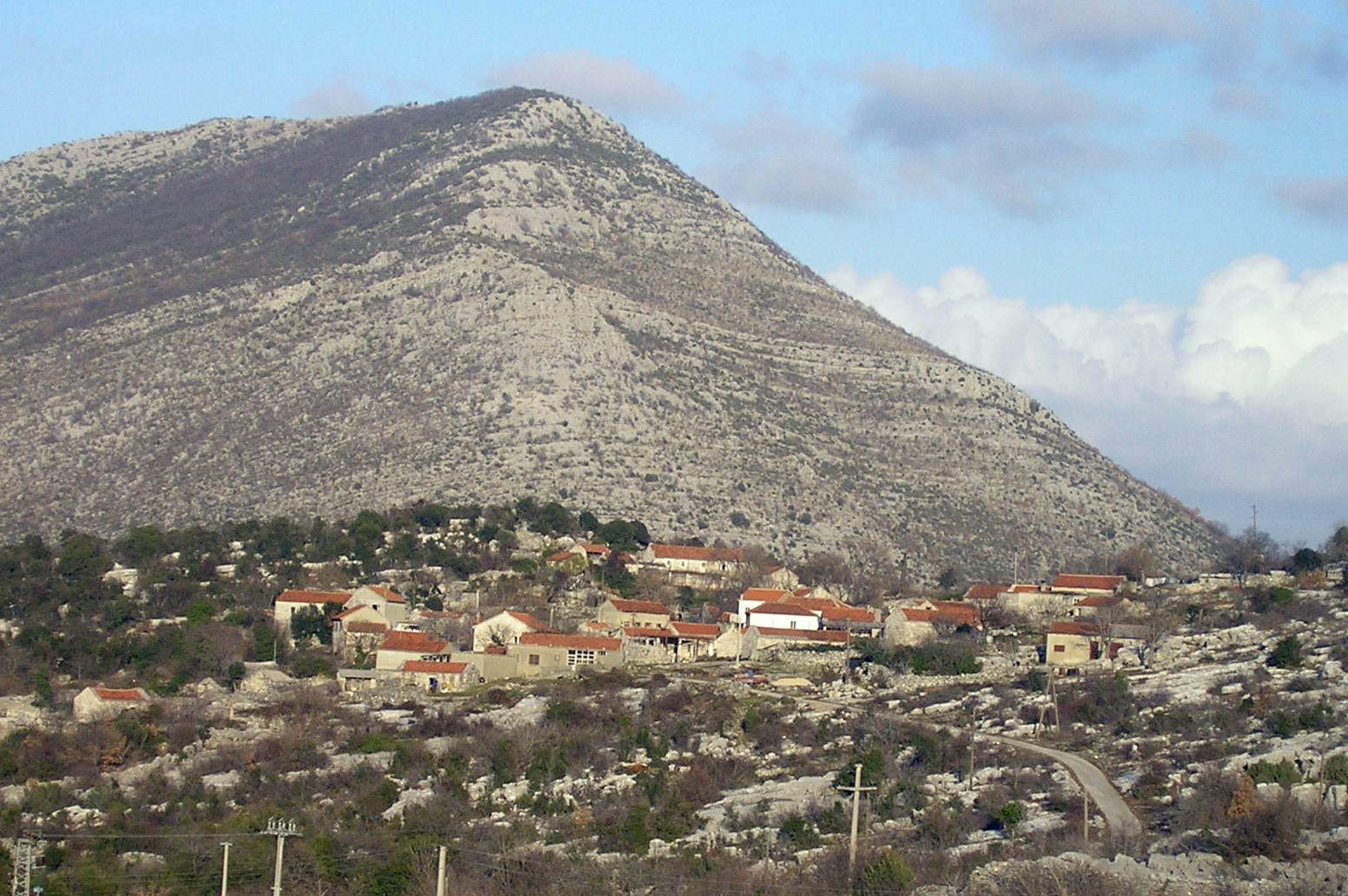 Pogled na Donji Zelenikovac